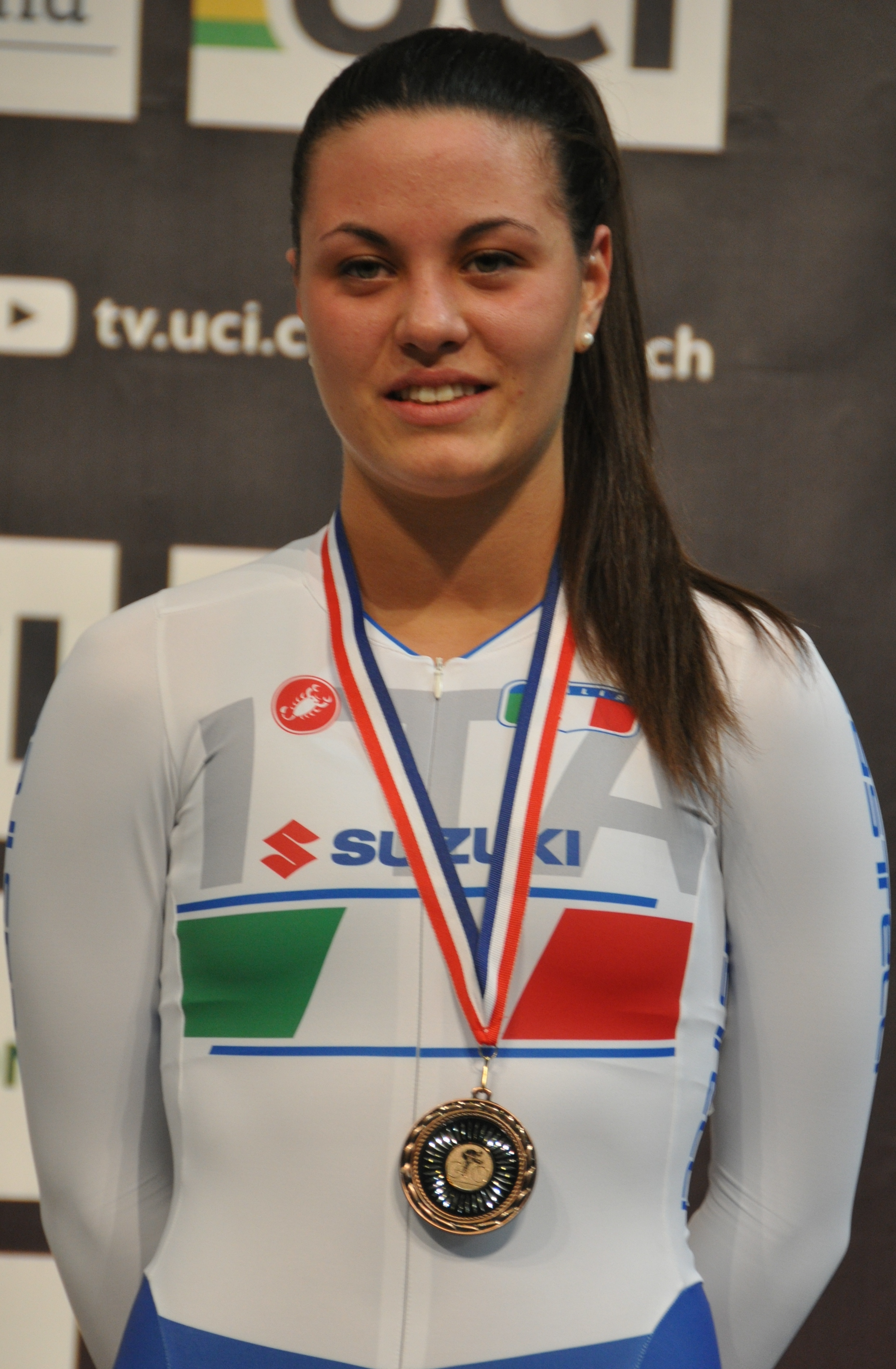 Rachele Barbieri, italienische Radsportlerin, Bronze im Omnium